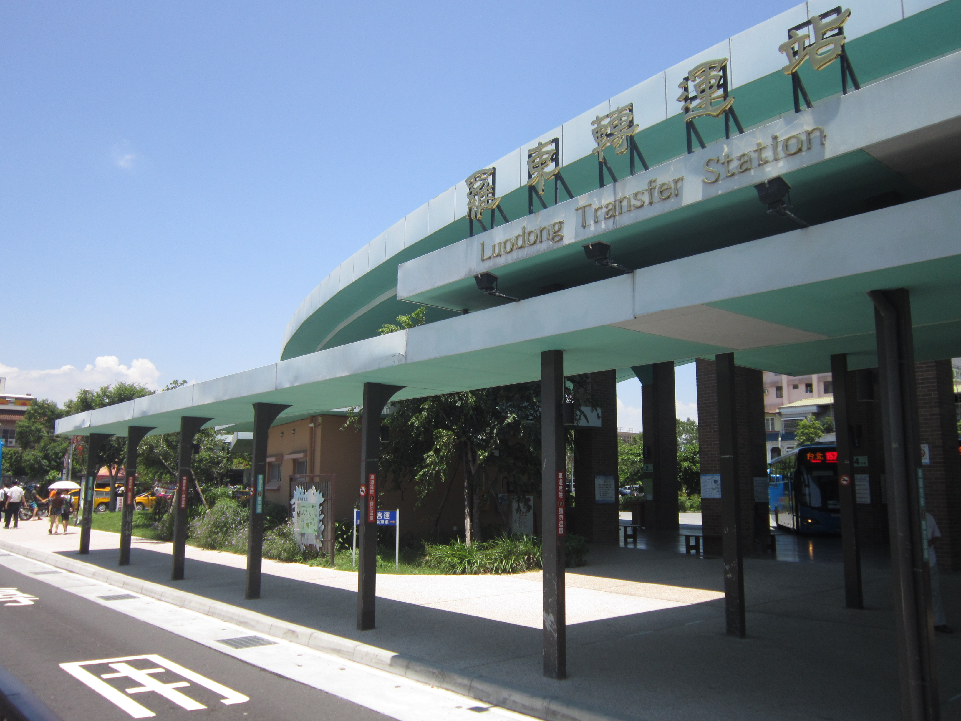 羅東轉運站外宜蘭市區公車的候車亭及公車專用道